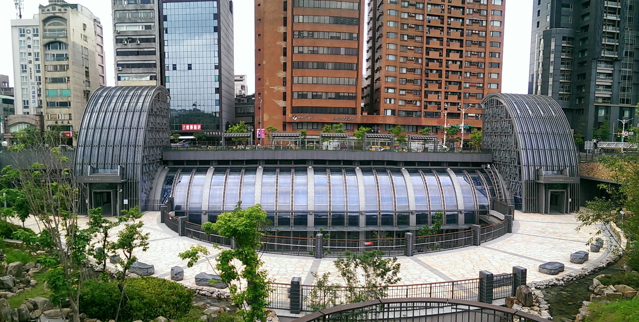 中文（台灣）: 大安森林公園站光塔與庭園